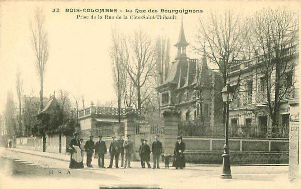 Bois-Colombes.Rue de la Côte Saint-Thibaut.Manoir